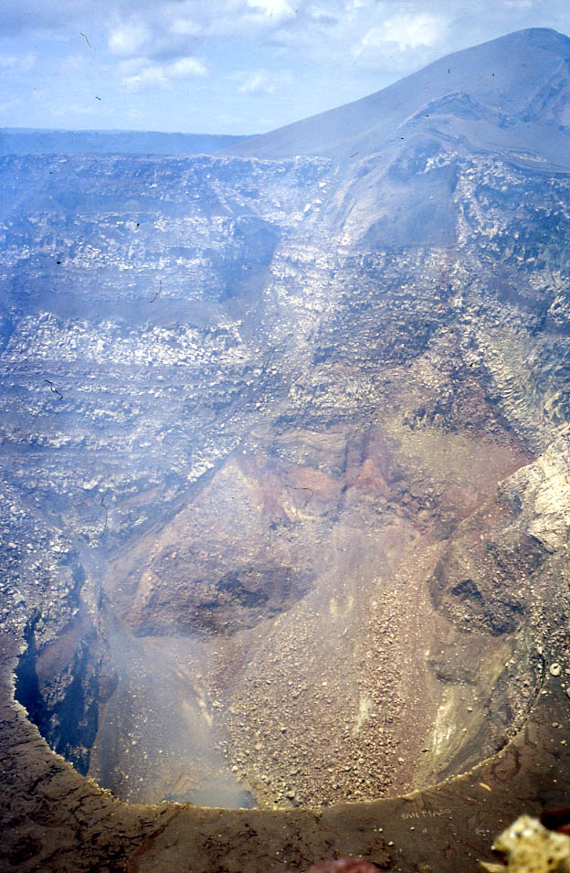 Cráter del Volcán MAsya. Nicaragua. 2002